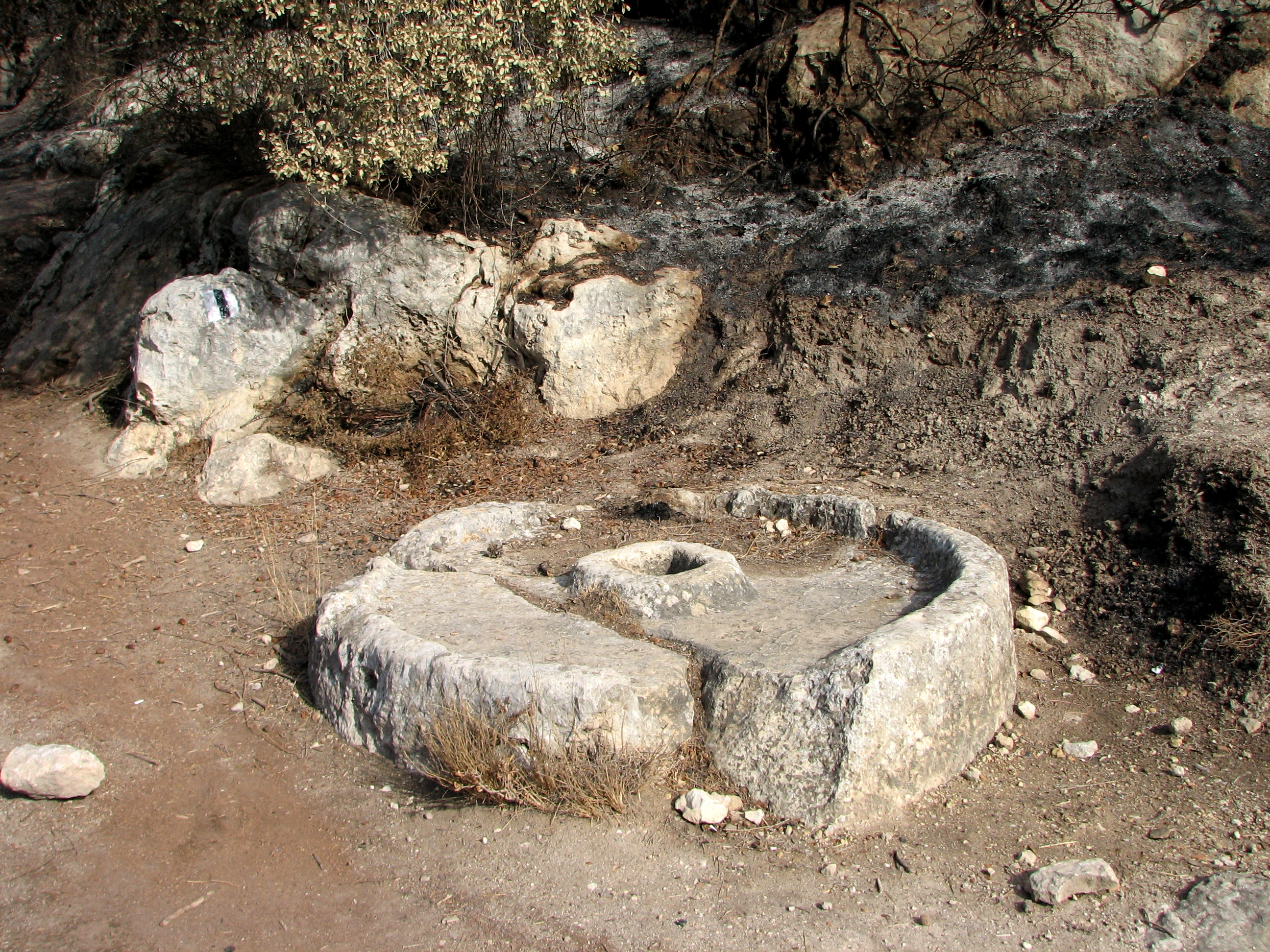 Kdumim Quarriesת, mount Carmel Israel מחצבות קדומים היא מחצבה קדומה של אבן גיר מהתקופה הרומית-ביזנטית הנמצאת בצד פיתול חד של כביש 721 העולה מעתלית לבית אורן אבן תחתונה של בית בד המכונה "ים" נמצאת באזור המחצבה